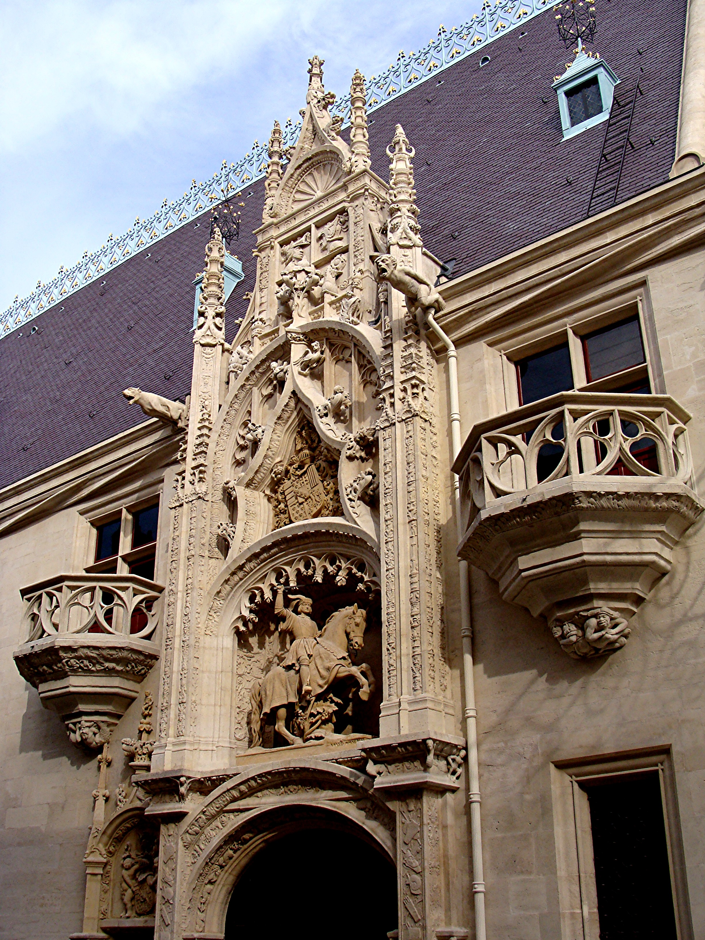 détail de la façade du Musée Lorrain, Nancy